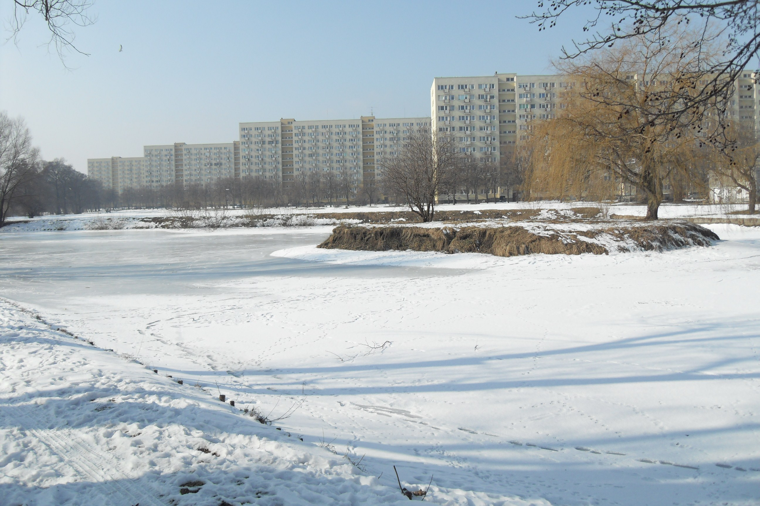 Gdańsk Żabianka. Potok Oliwski i bloki przy ul. Pomorskiej (bloki od prawej: 82, 86, 90 i 94).